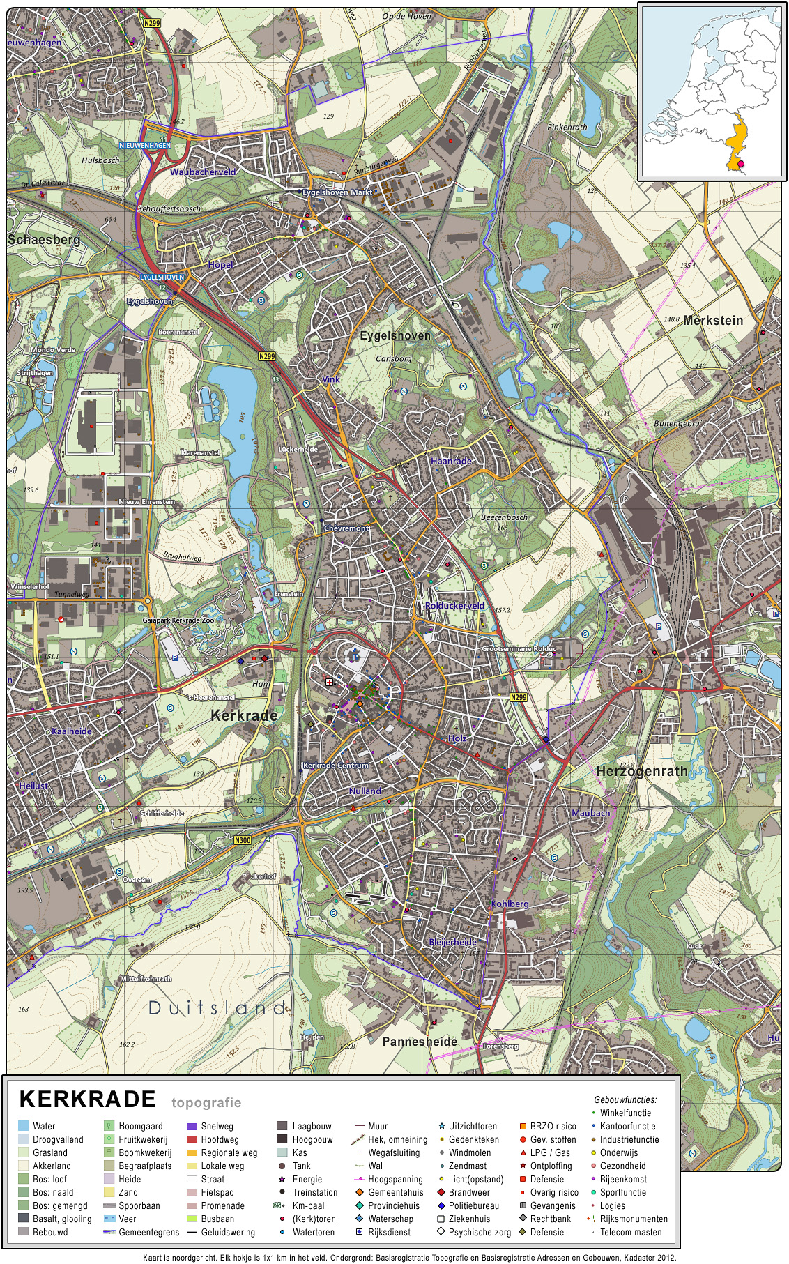 Topografisch beeld van de stad Kerkrade. Op basis van de GML open geodata van de BRT/Top10NL (basisregistratie Topografie, Kadaster 2012), vrijgegeven door Kadaster op 30-11-2012 onder de Creative Commons BY licentie. Gebouwvlakken vanuit Open Geodata BAG extract (december 2012). Samenstelling en kleurenschema: Jan-Willem van Aalst, met QuantumGIS en Photoshop.